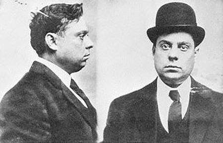 Ignazio „Lupo“ Saietta Mugshot